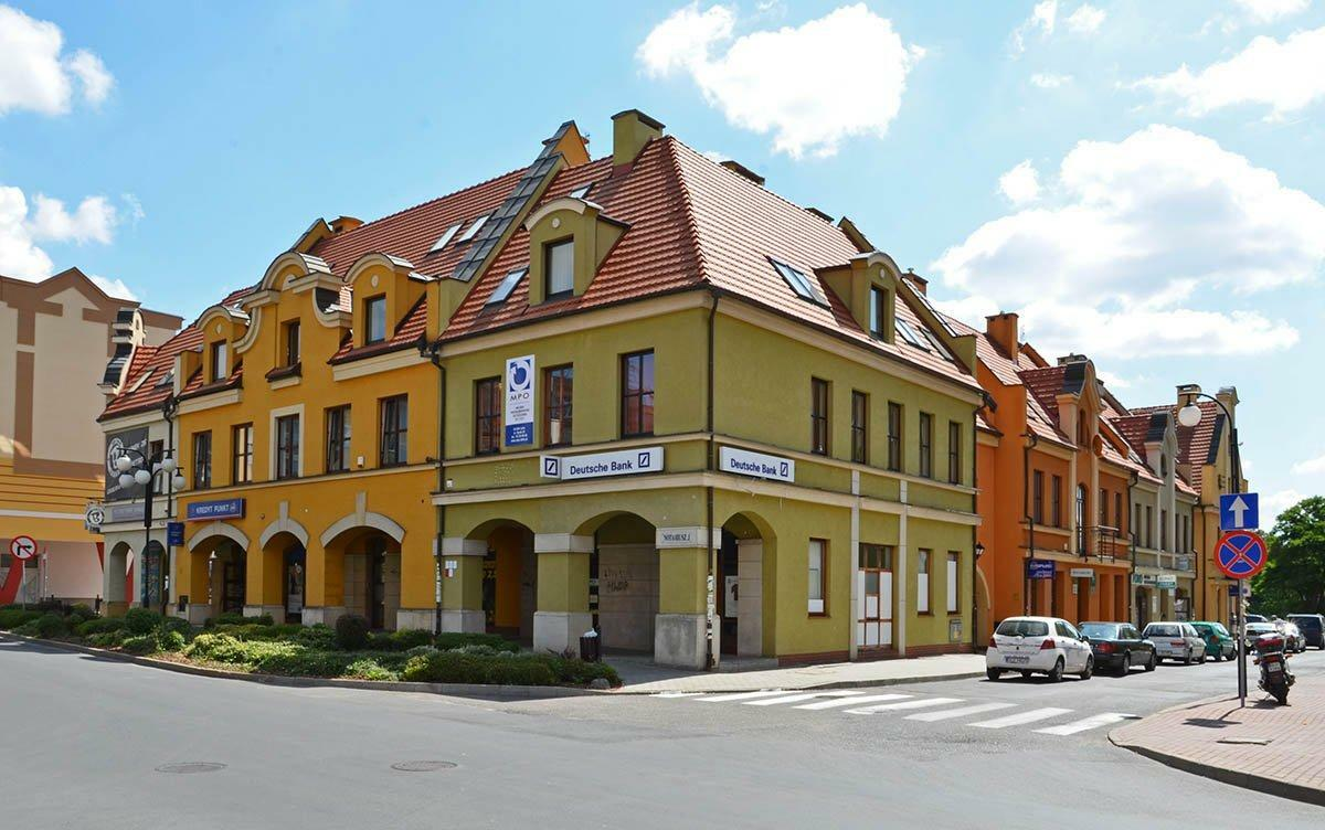 Południowo-wschodnia pierzeja Rynku. Od lewej numery 26, 27 i 28. Po prawej ulica Chrobrego.